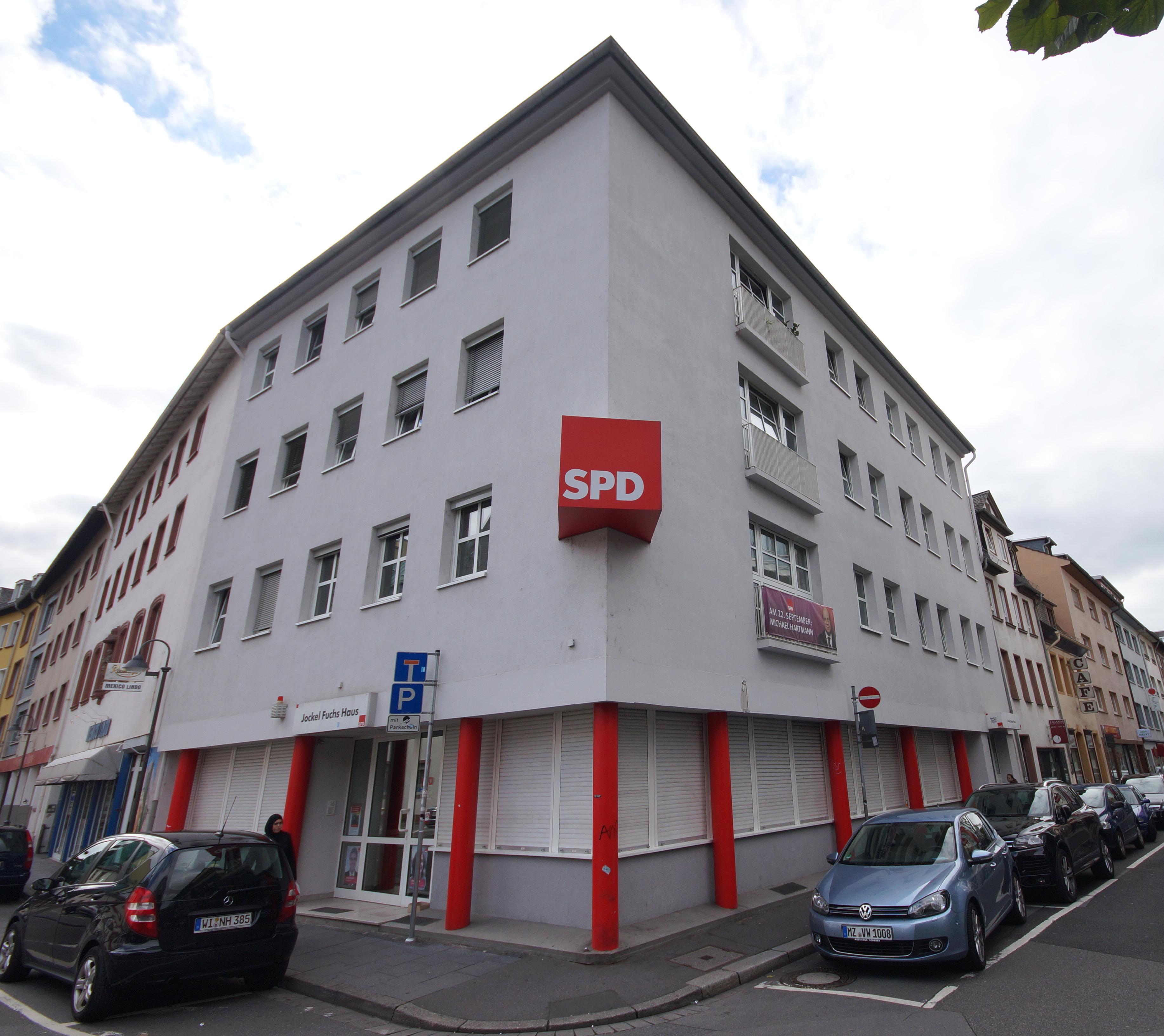 Die Landesgeschäftsstelle der SPD Rheinland-Pfalz in Mainz, auch „Jockel Fuchs Haus“ genannt.